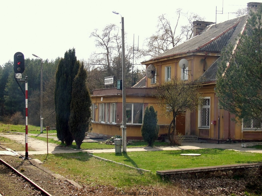 Siemiatycze